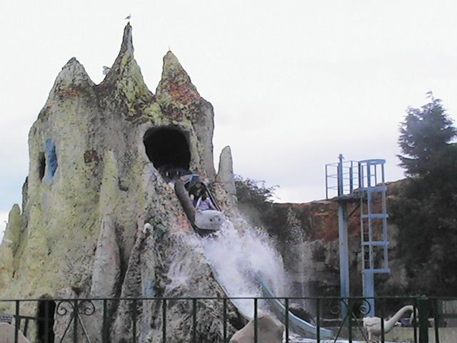 Logflume